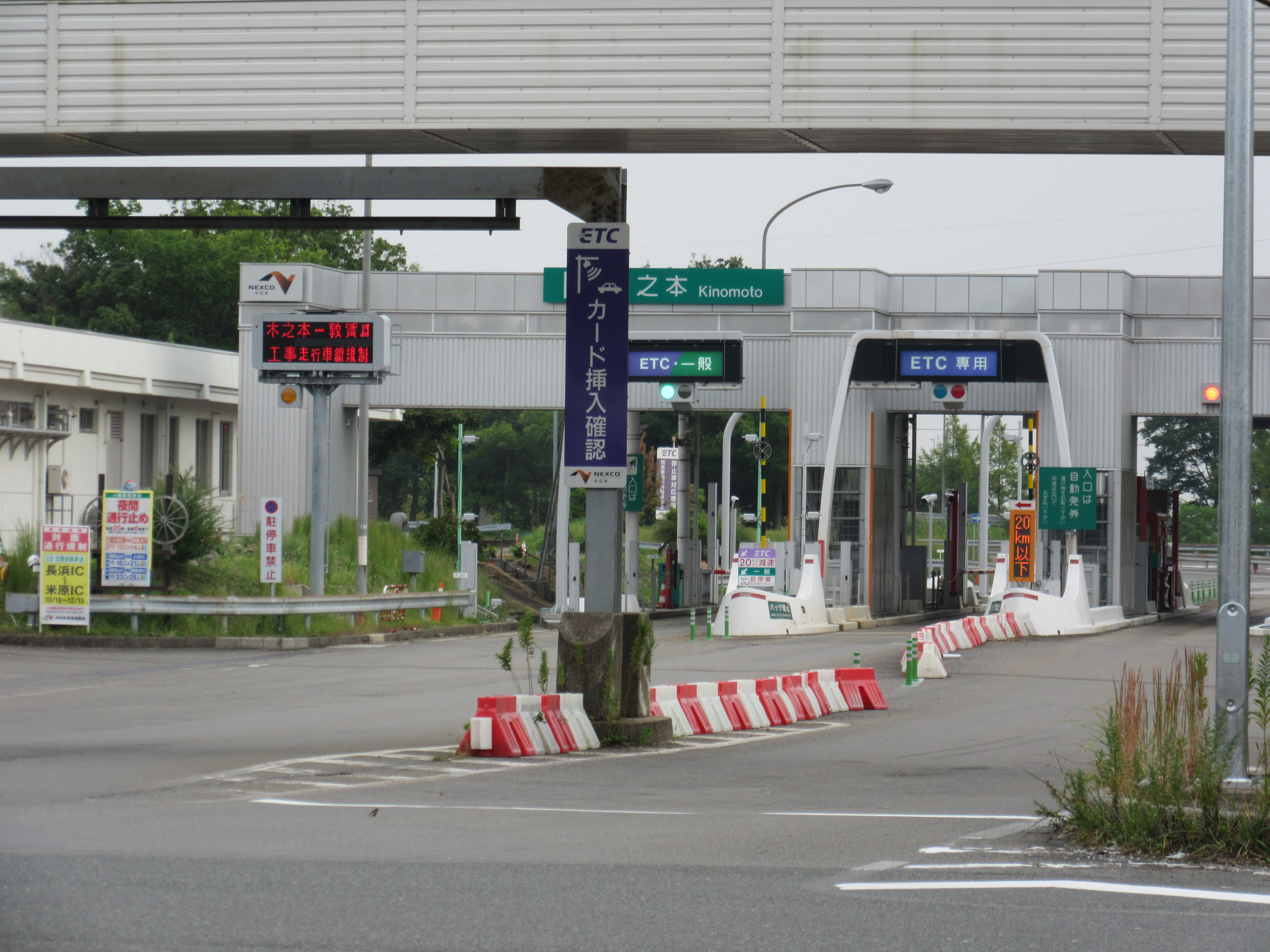 木之本IC料金所